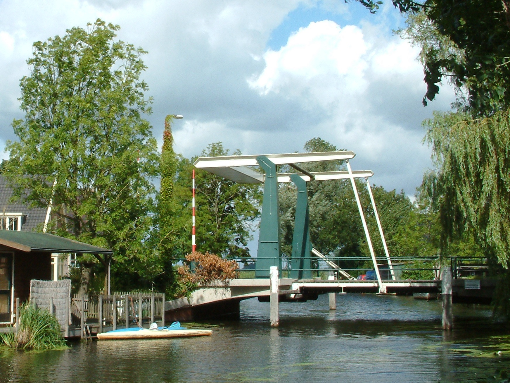 De Sint Jacobsbrug over de Wijde Giessen in Ottoland